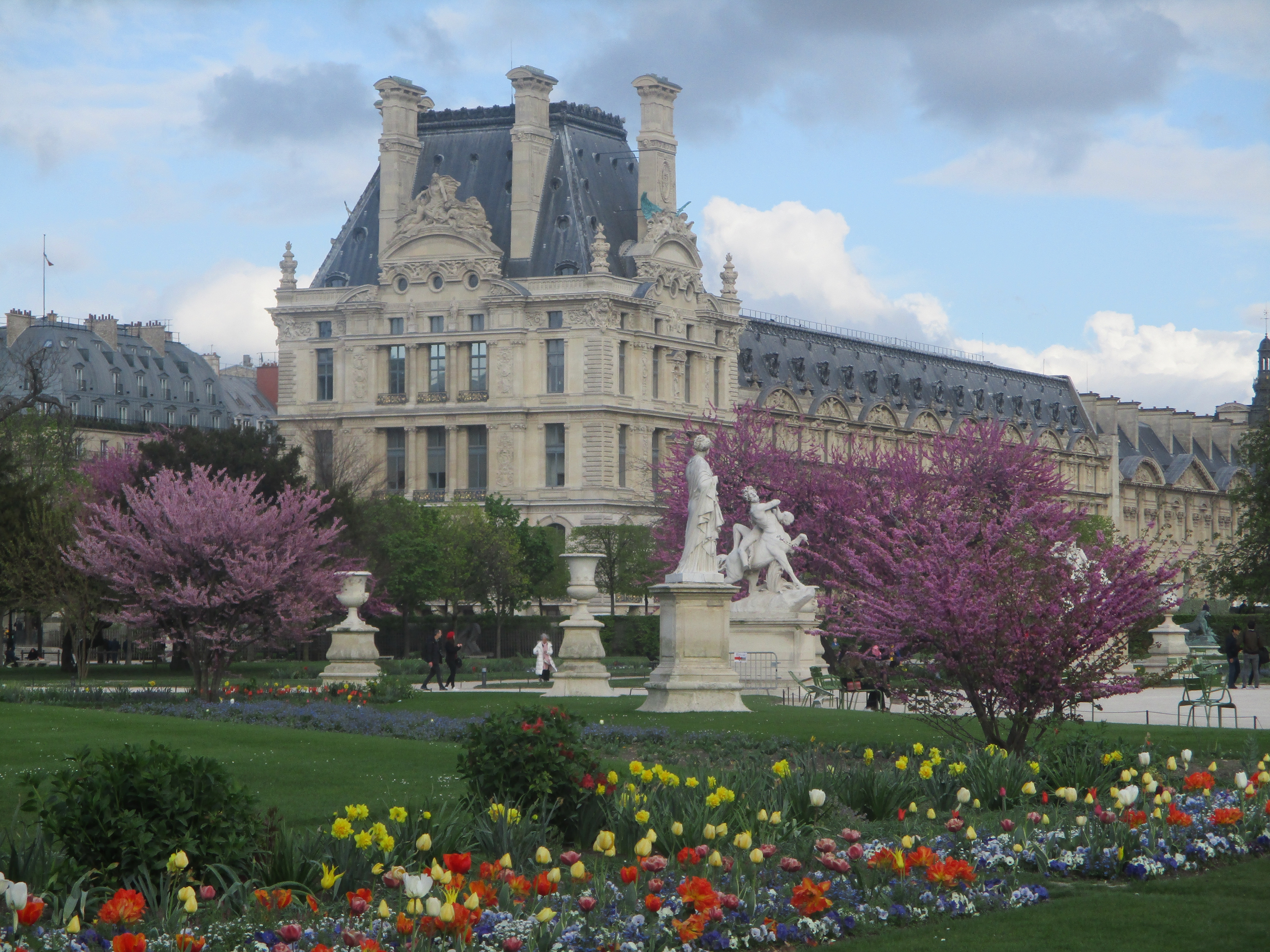 Jardin des Tuileries au printemps avec le Louvre (pavillon de Marsan) au fond.